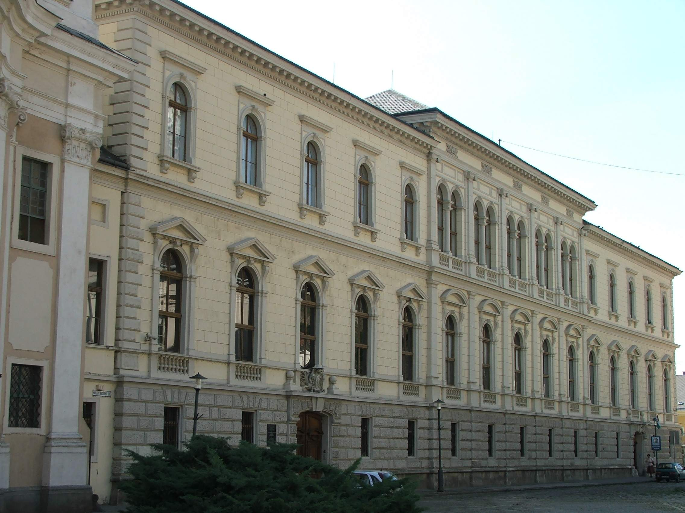 Primate's palace